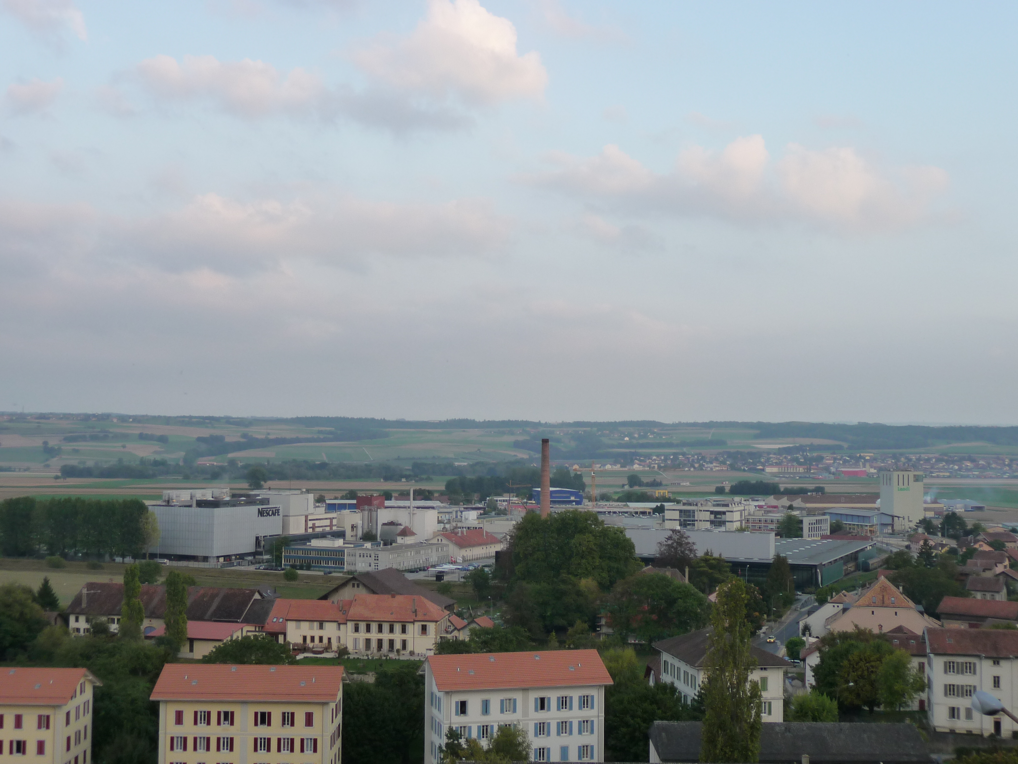 Orbe.